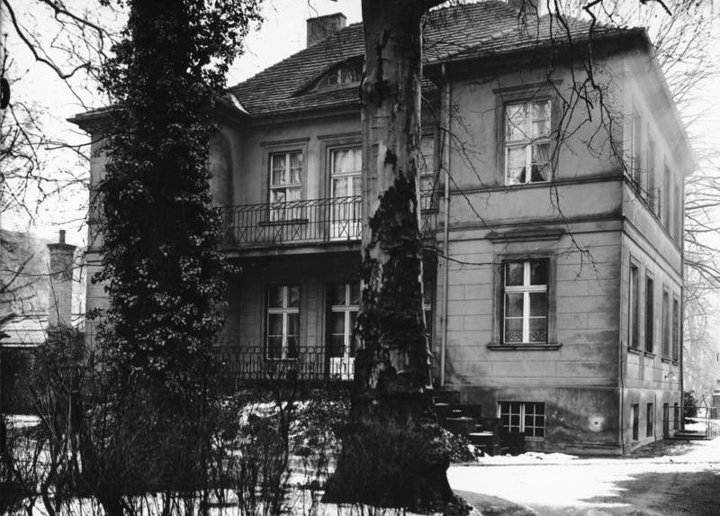 Berlin Alter Westen. Tiergartenstrasse 28 erbaut um 1800. Sommersitz des Verlegers Friedrich Unger. Straßenseite. Aufnahme 1930